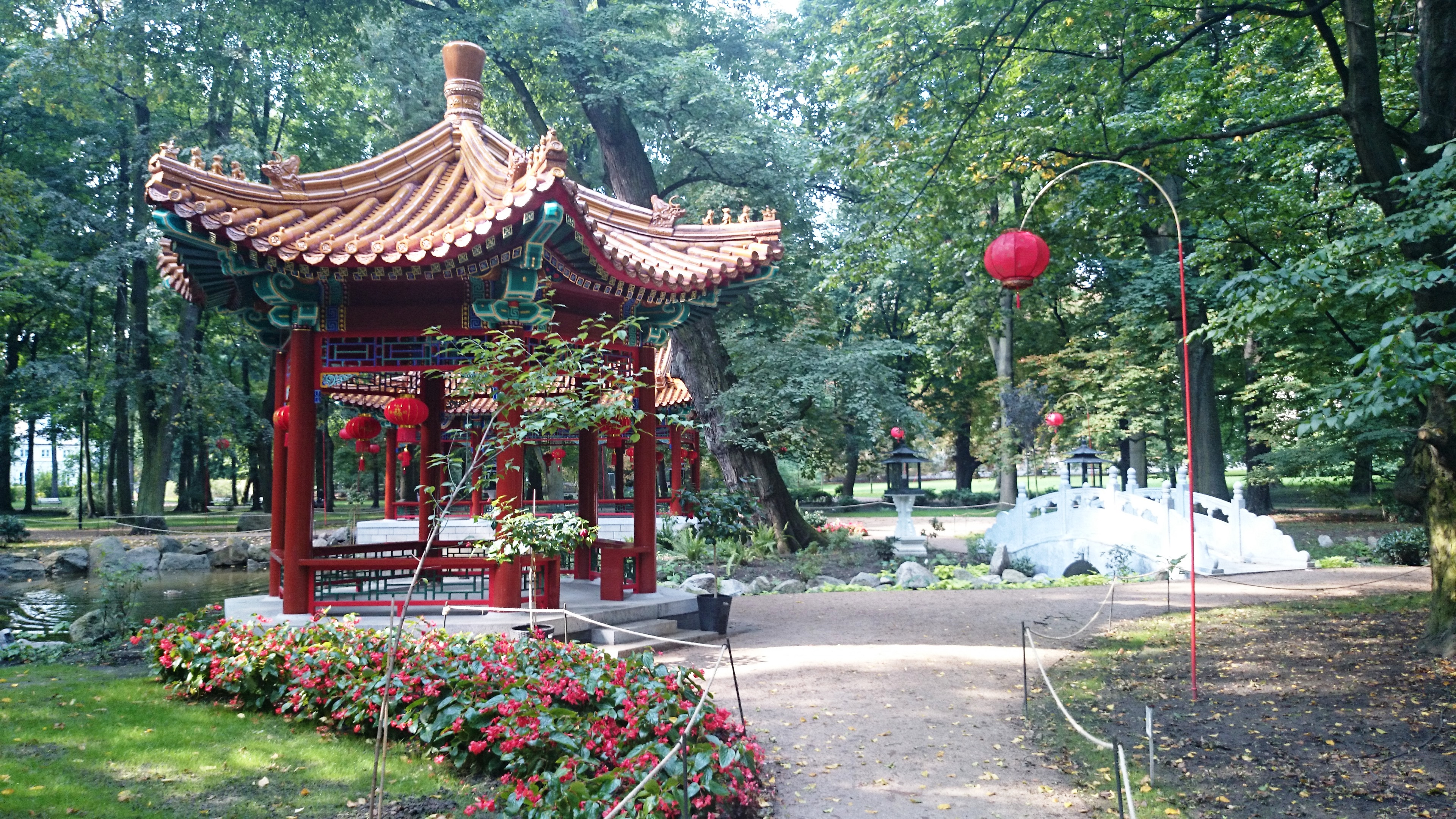 Rotunda w Ogrodzie Chińskim w Łazienkach